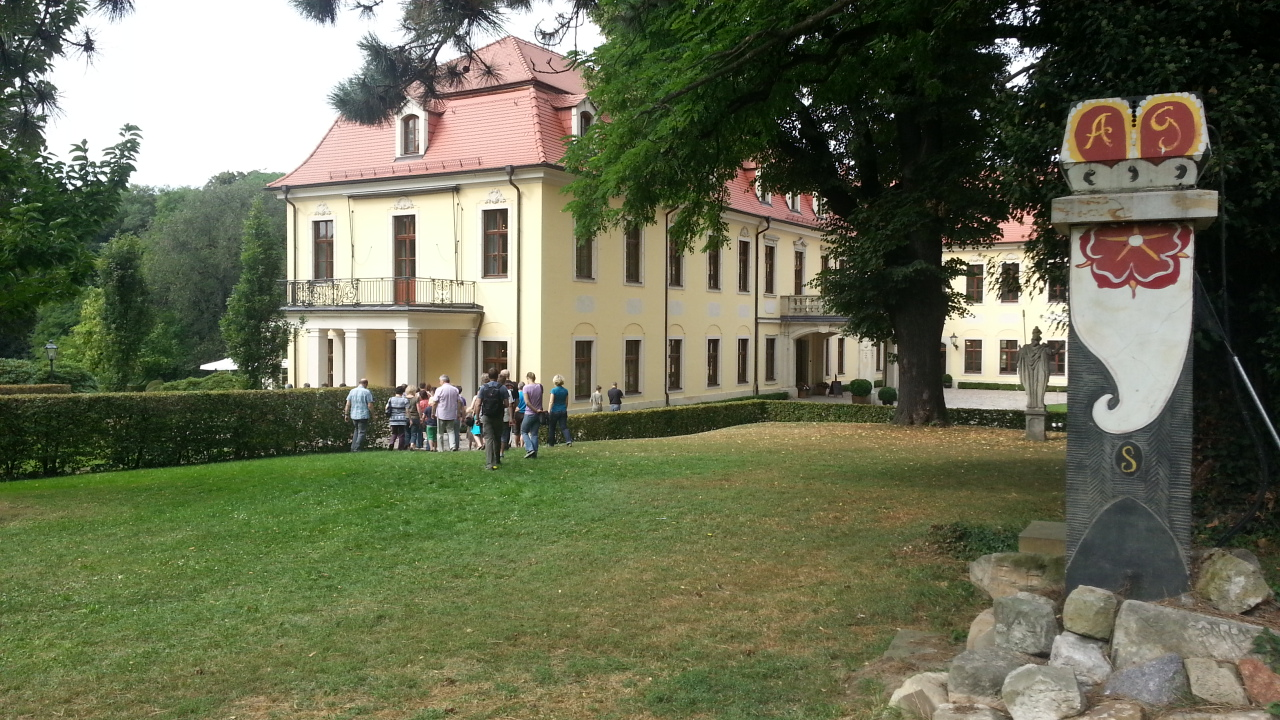 Der Innenhof von Schloss Proschwitz, im Vordergrund der als Säule gestaltete Schornstein des in den 2000ern in den Weinkeller eingebauten Kamins mit Familienwappen